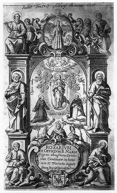 Тытульны ліст з кнігі Rosarium..., 1672-1677 гг.